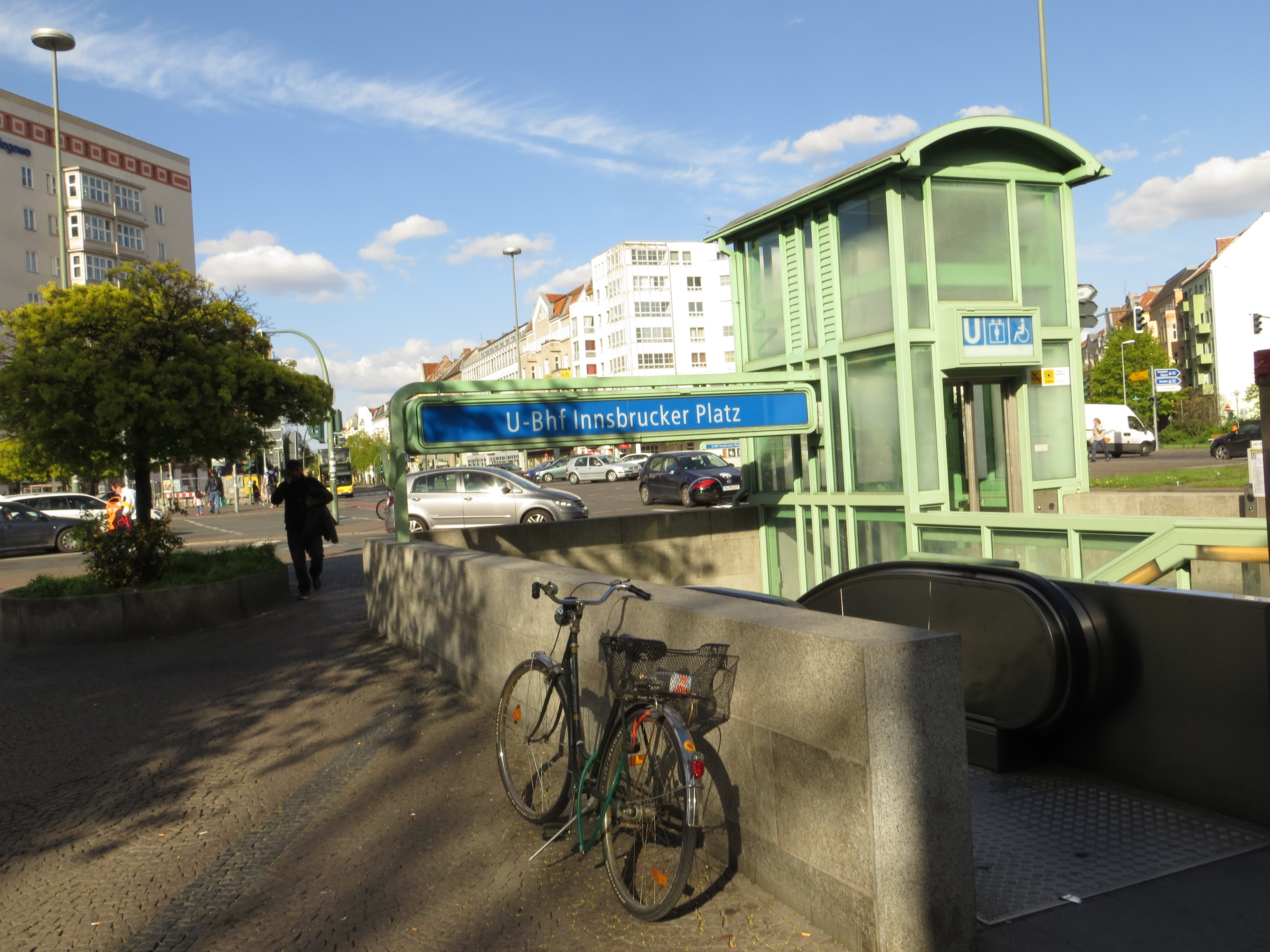 The entrance of the U-Bahn station Innsbrucker Platz.